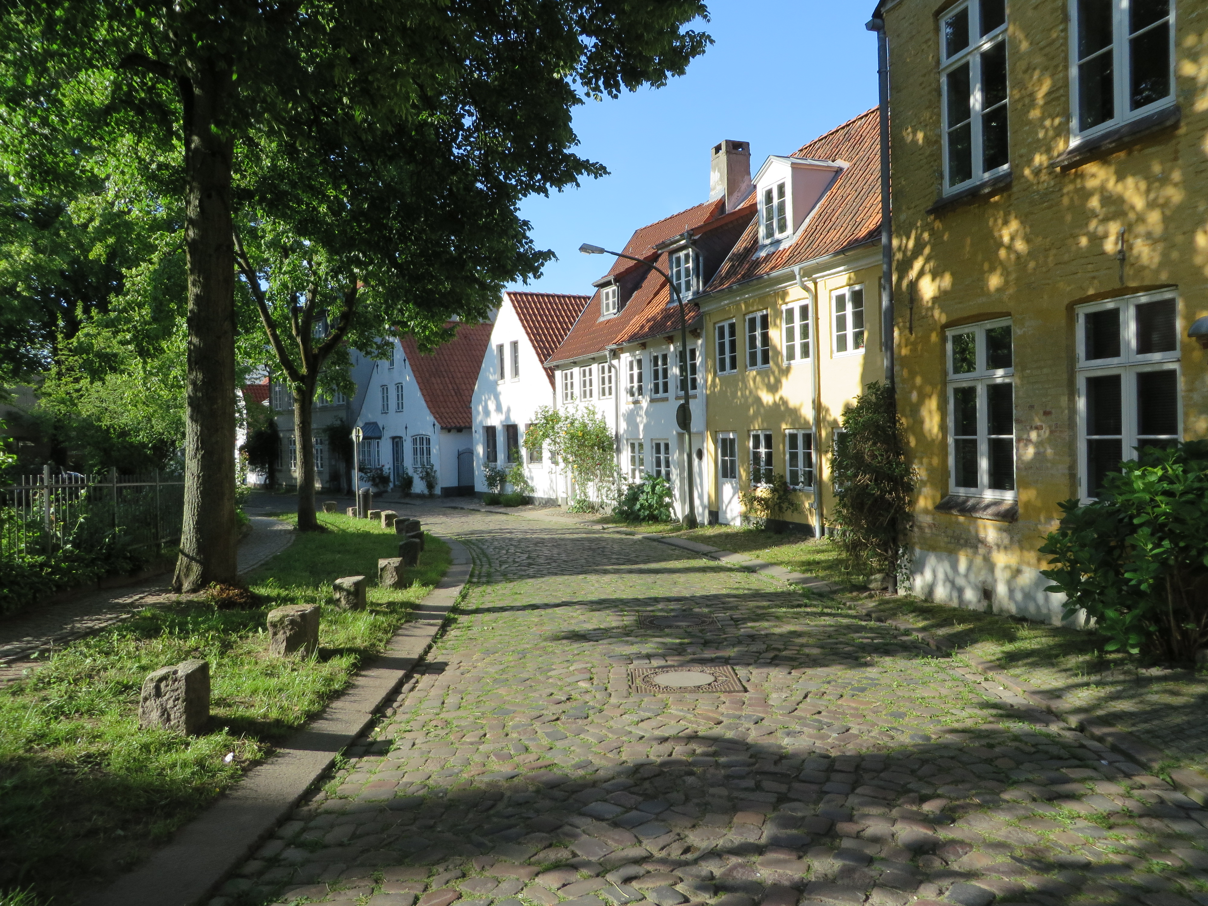 Johanniskirchhof (Johannisviertel Flensburg Mai 2014), Bild 01